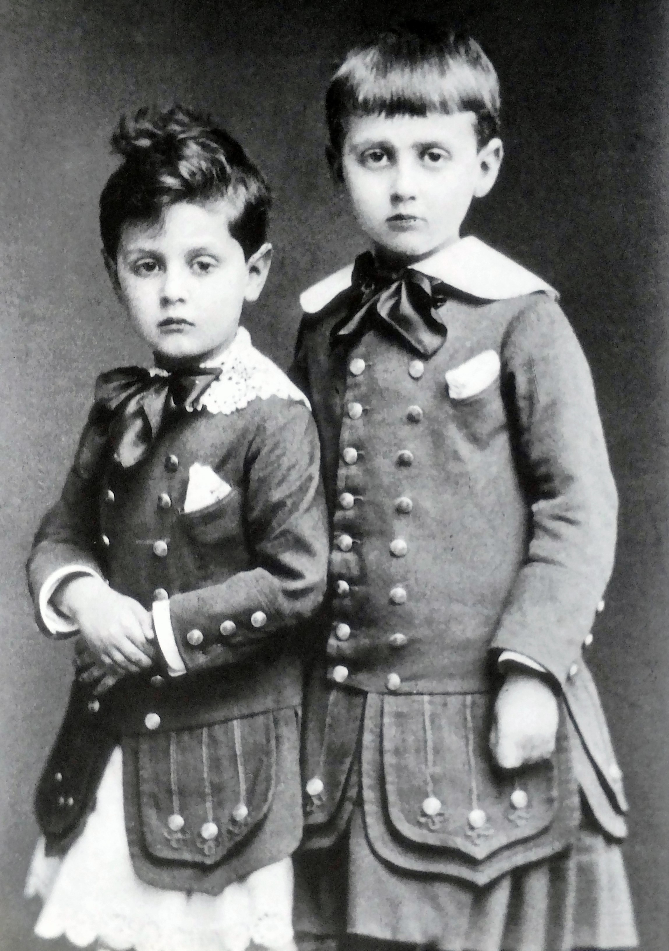 Robert et Marcel Proust (à droite) en 1877. Sur carton du photographe Modeste Chambay, photographe au Grand-Hôtel, Paris. Fond Roger-Violet.